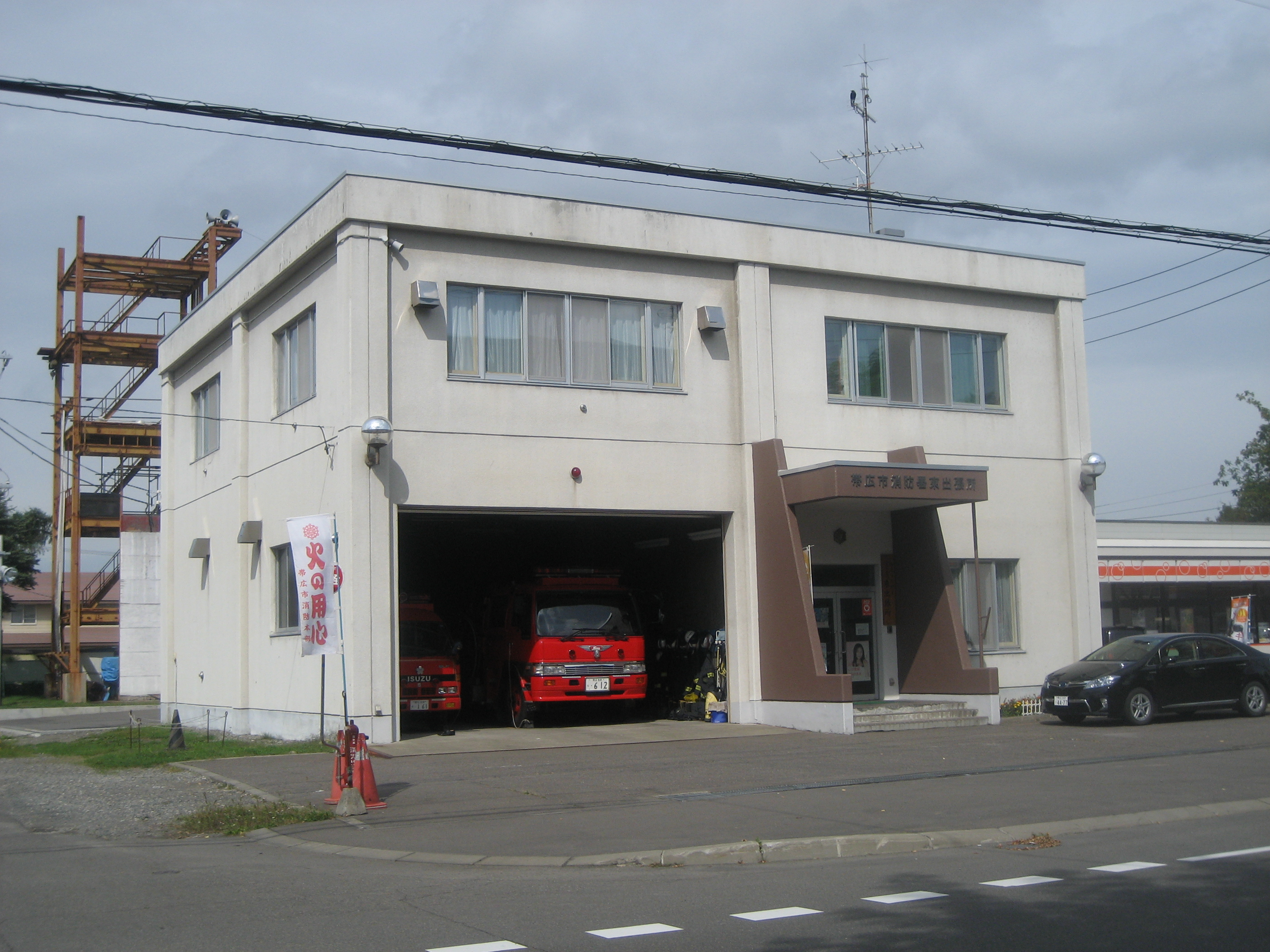 帯広市消防本部・東出張所庁舎